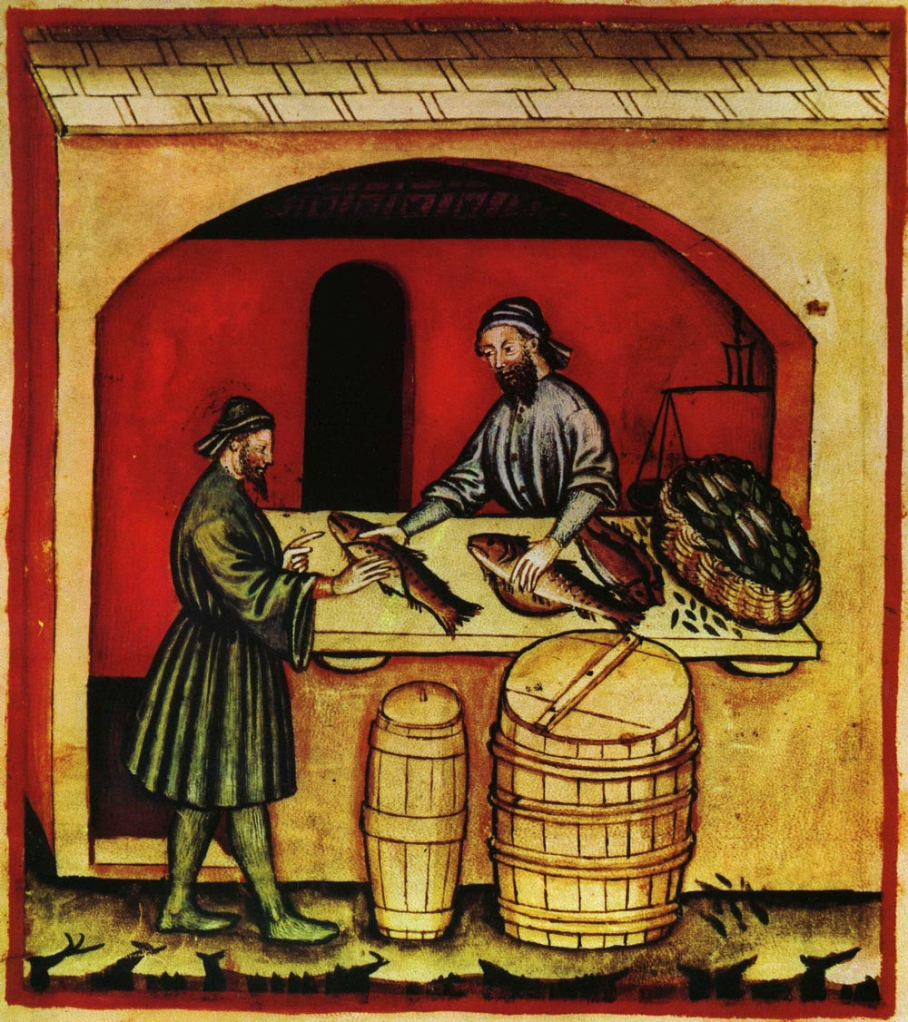 Tacuina sanitatis (XIV century)